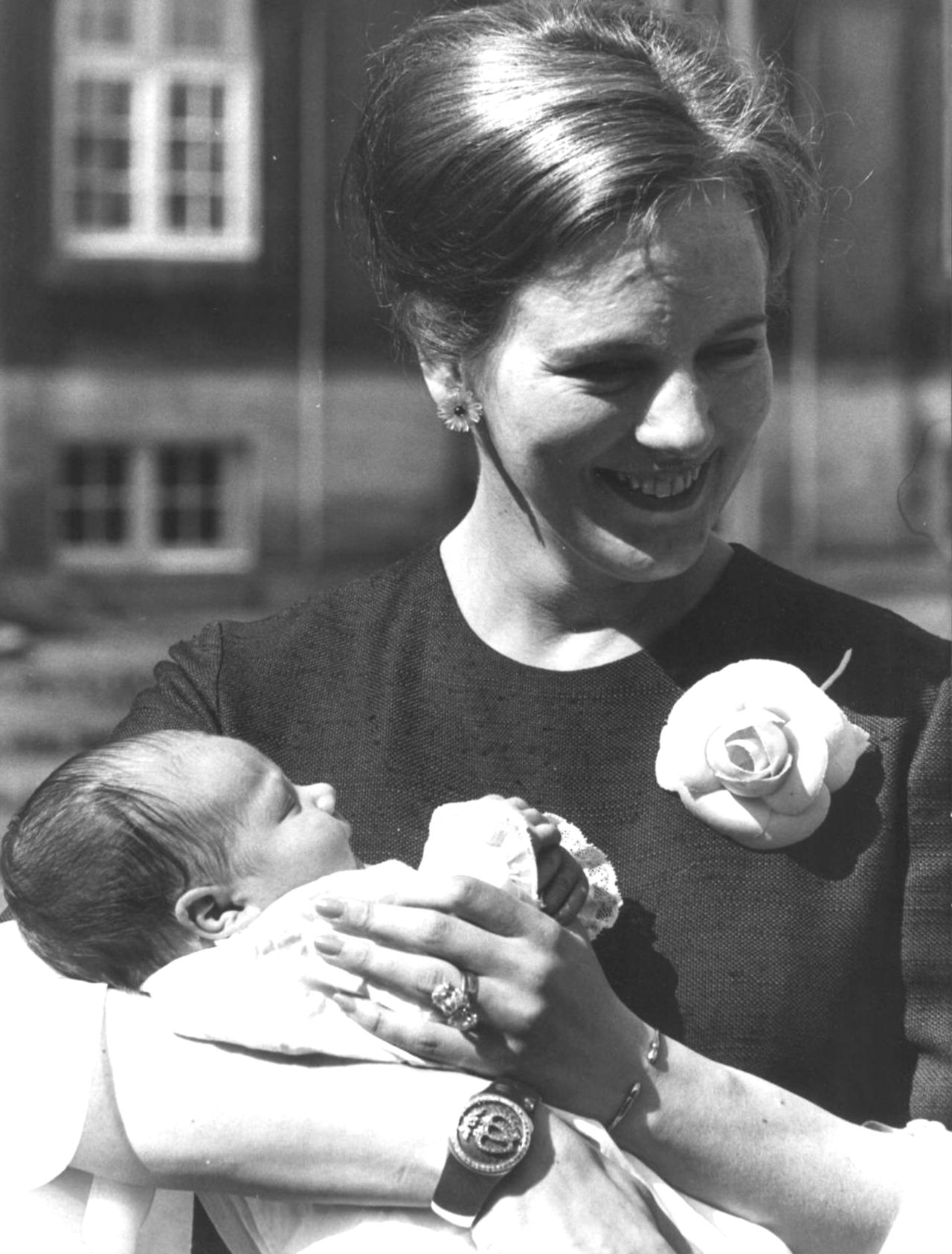 Prinsesse Margrethe præsenterer sin førstefødte, kronprins Frederik, for pressen i en enkelt kjole med en masse accessories.